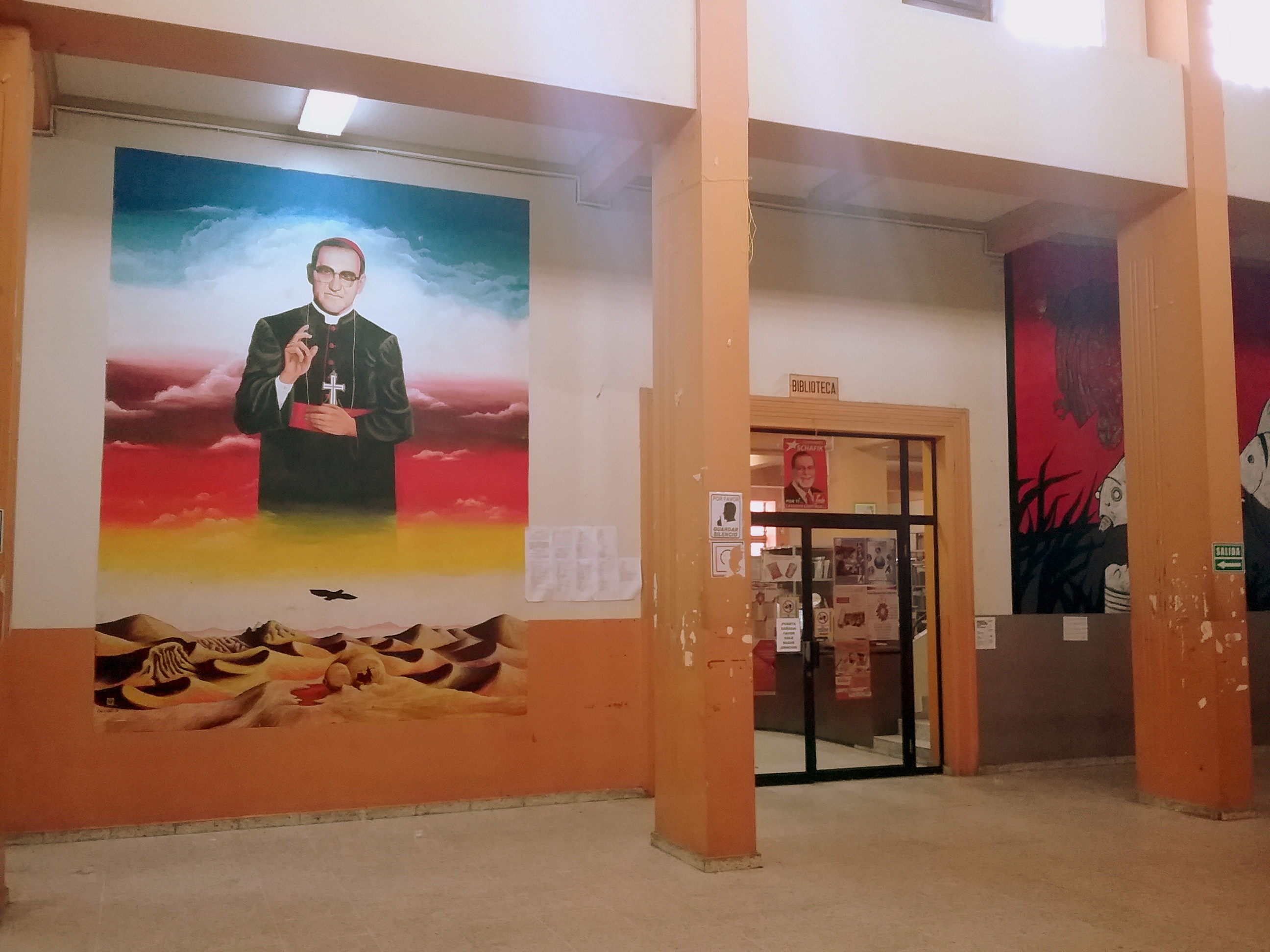 Biblioteca de la Facultad deJurisprudencia y Ciencias Sociales de la Universidad de El Salvador.